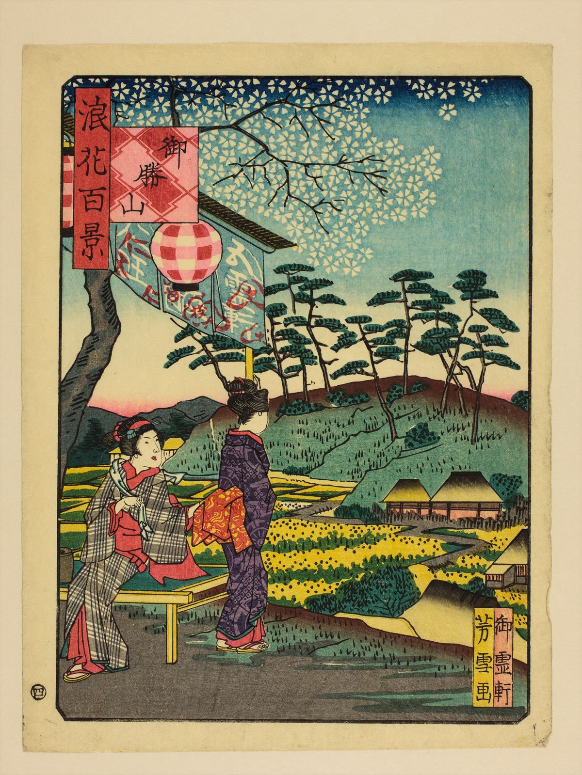 1800年代。南粋亭芳雪/画。浪花百景 102枚のうちの1枚。大阪市立中央図書館蔵。